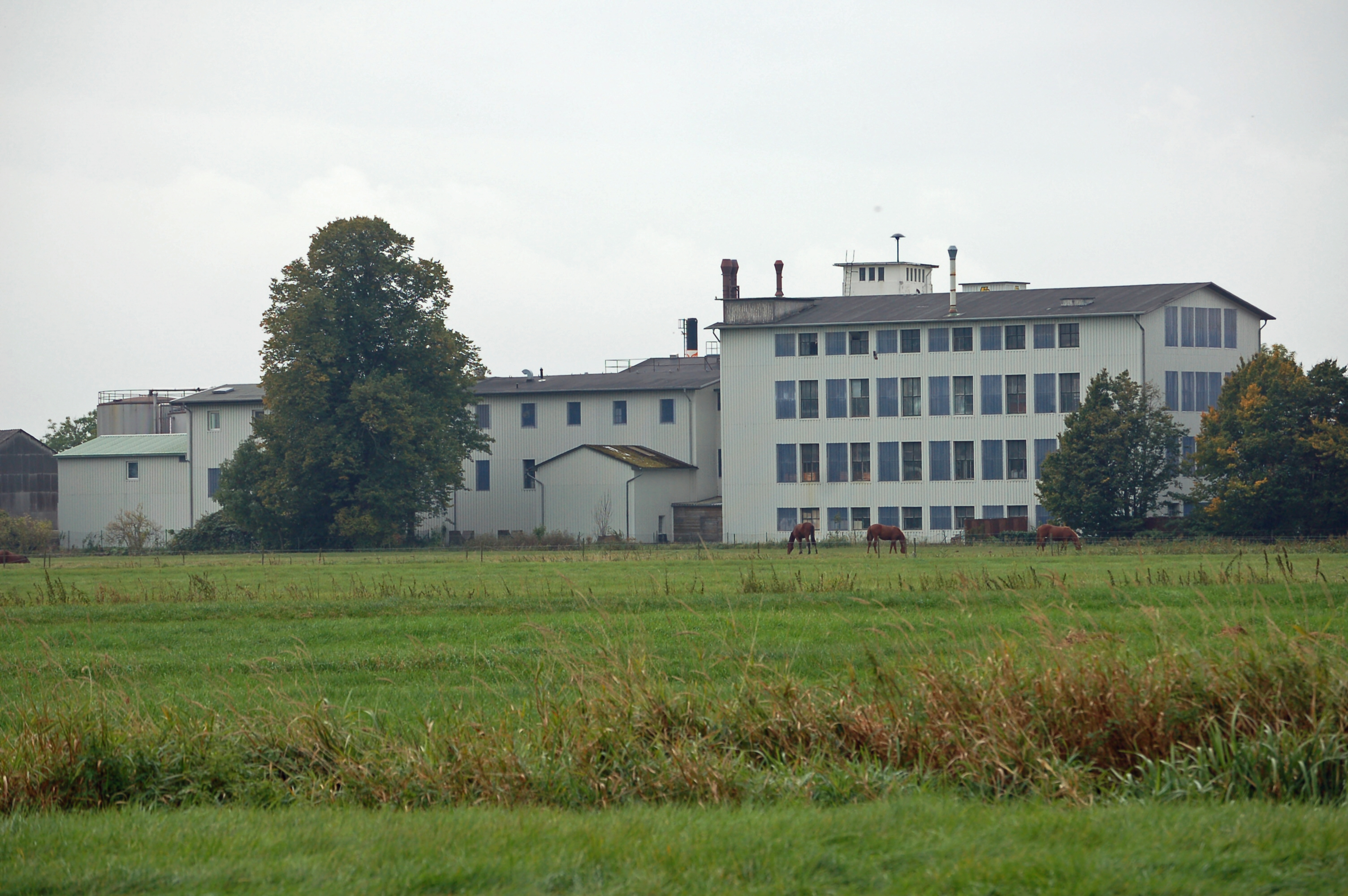 Die ehemalige Kunstdüngerfabrik von Ludwig Meyn in Uetersen, heute Harles und Jentzsch ein Spezialbetrieb für die Verarbeitung von tierischen und pflanzlichen Fetten und Ölen sowie deren Derivate.